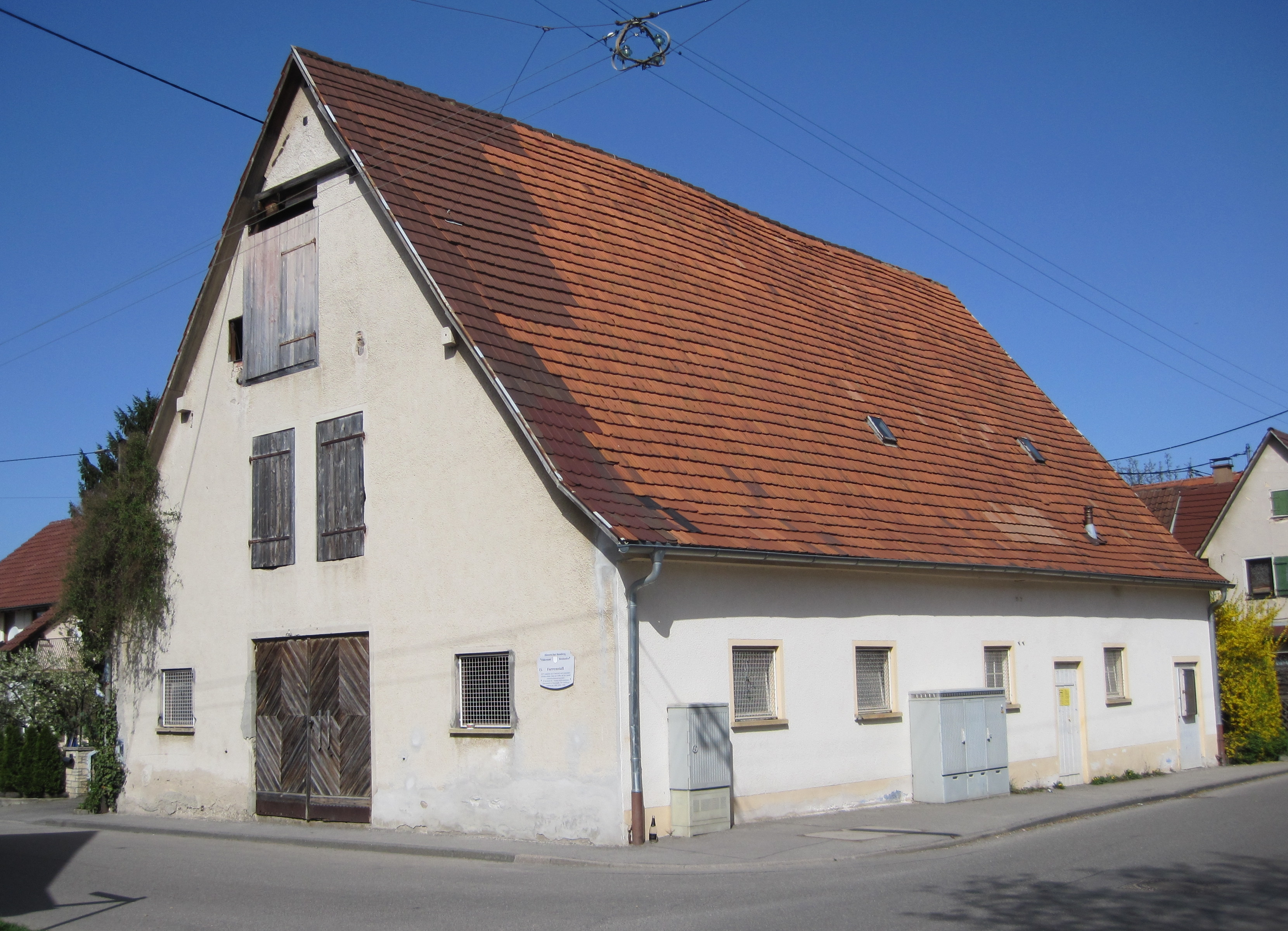 Ehemaliger Farrenstall in Filderstadt-Bonlanden, 1877 erbaut. Oberdorfstraße 48. Zunächst Schafstall und Gemeindescheune. Später zur Hälfte als Farrenstall genutzt.